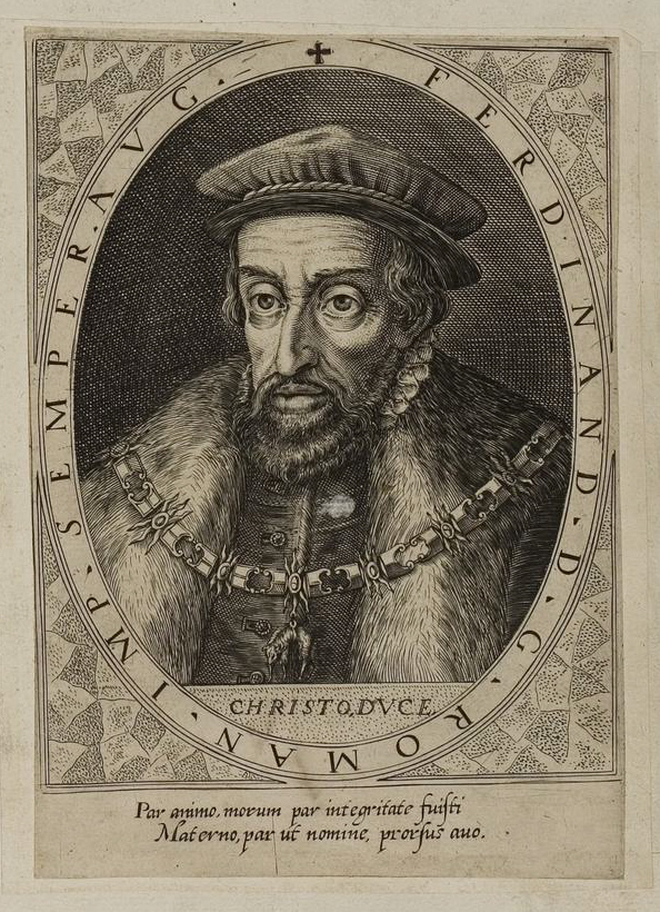 Grafik aus dem Klebeband Nr. 1 der Fürstlich Waldeckschen Hofbibliothek Arolsen Motiv: Kaiser Ferdinand